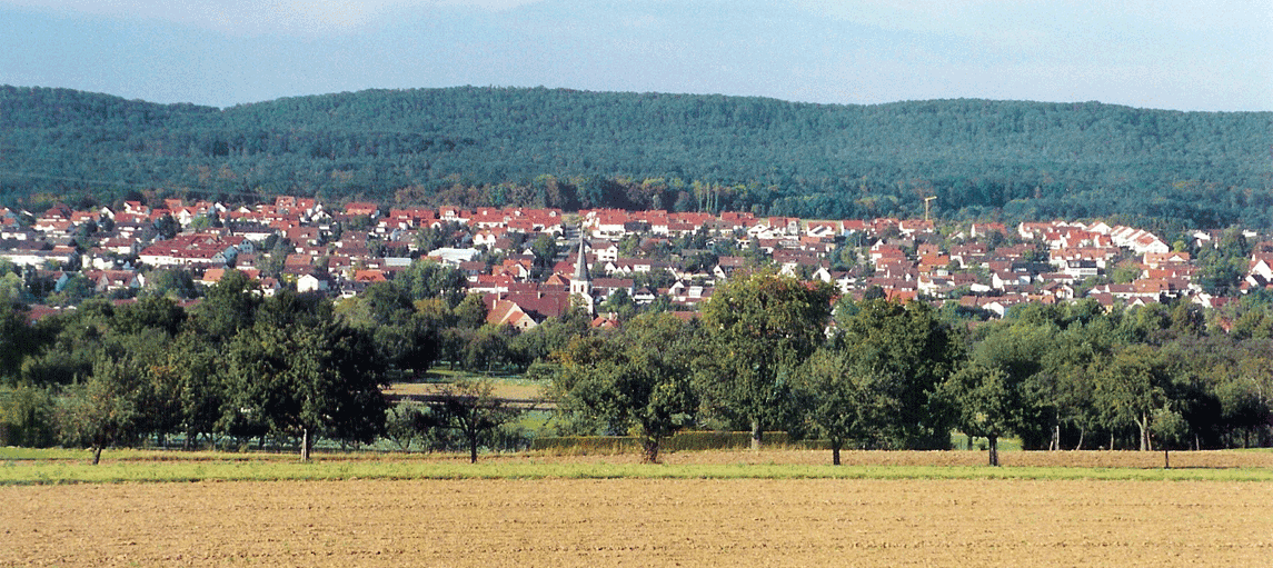 Ortsansicht von Illingen/Württemberg, aufgenommen vom Süden aus